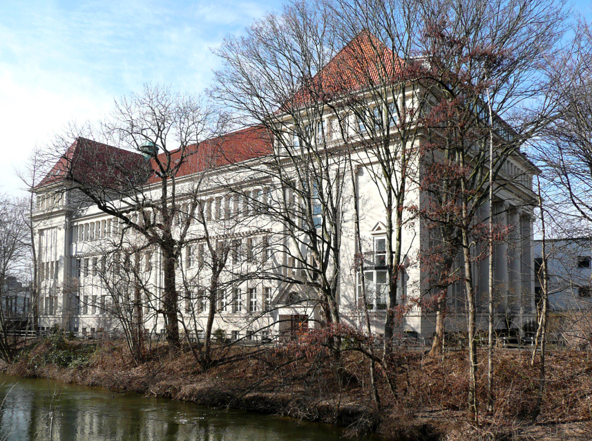 Hannover ehemalige Oberrealschule am Clevertor